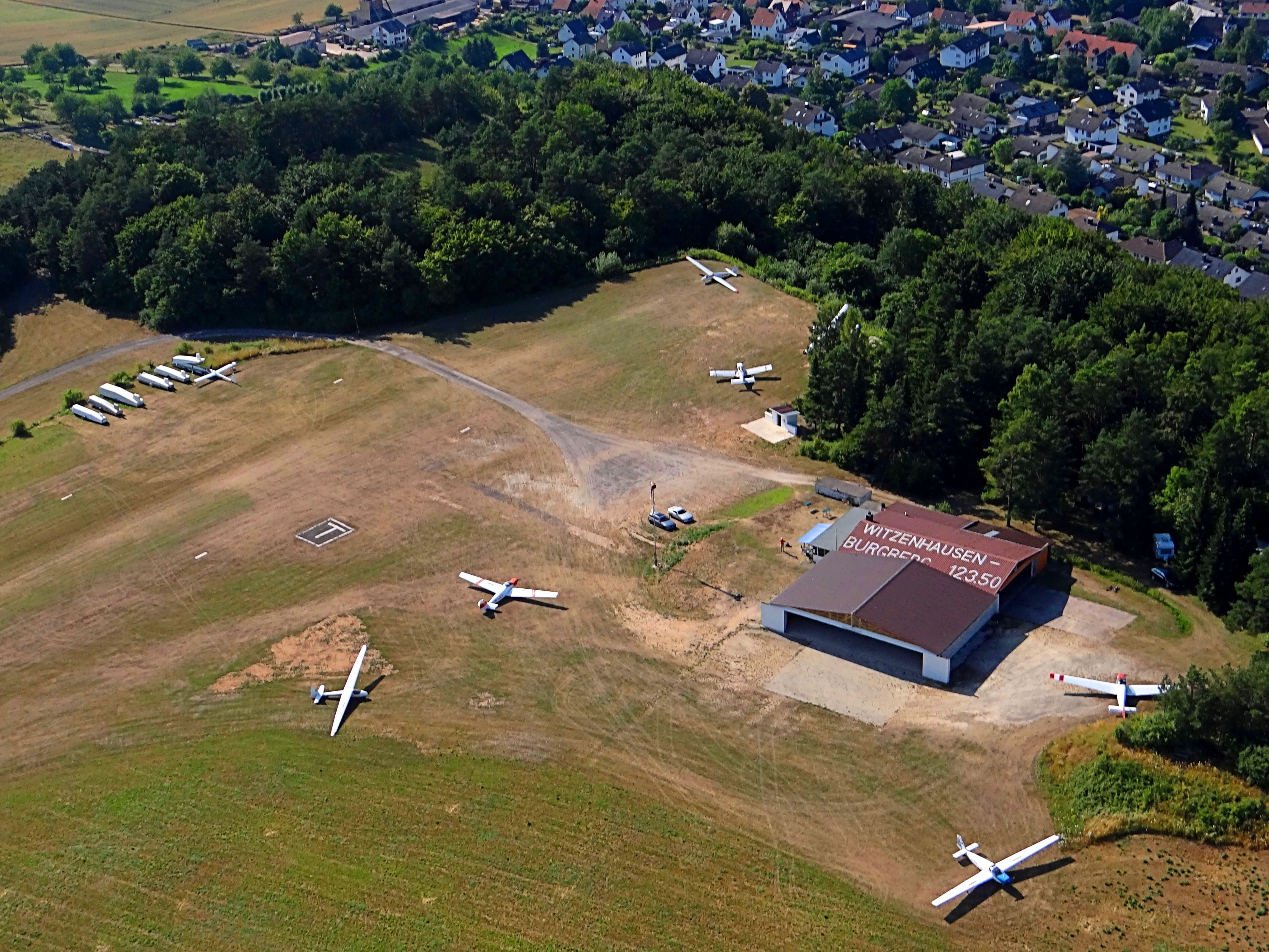 Luftbild vom Flugplatz Witzenhausen